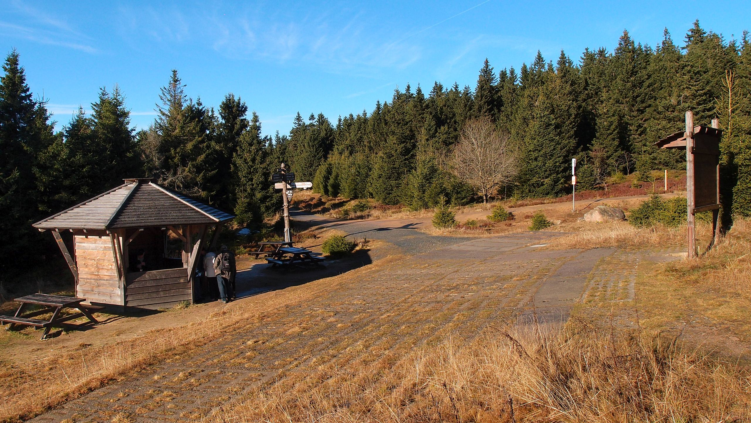 Blick von Osten auf das Wegkreuz am Dreieckigen Pfahl. Vorne links geht es entlang des Kolonnenweges zum Wurmberg, vorne rechts entlang der Sandbrinkstraße nach Schierke, hinten rechts entlang des Kolonnenweges zum Brocken und geradeausweiter nach Oderbrück. Weiter ist auf der linken Seite die Schutzhütte zu sehen.